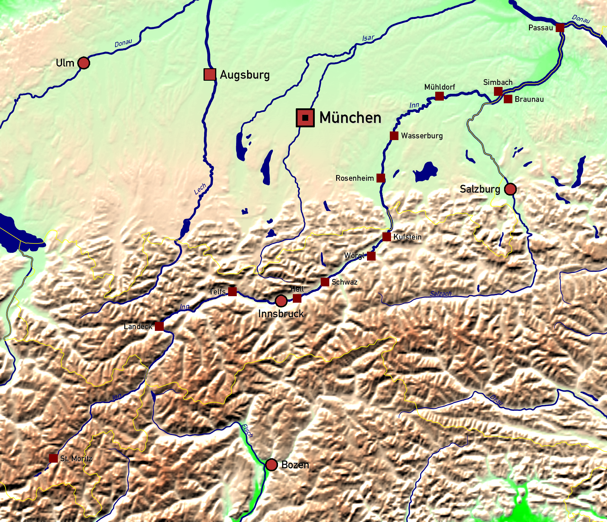 Verlauf des Flusses Inn.